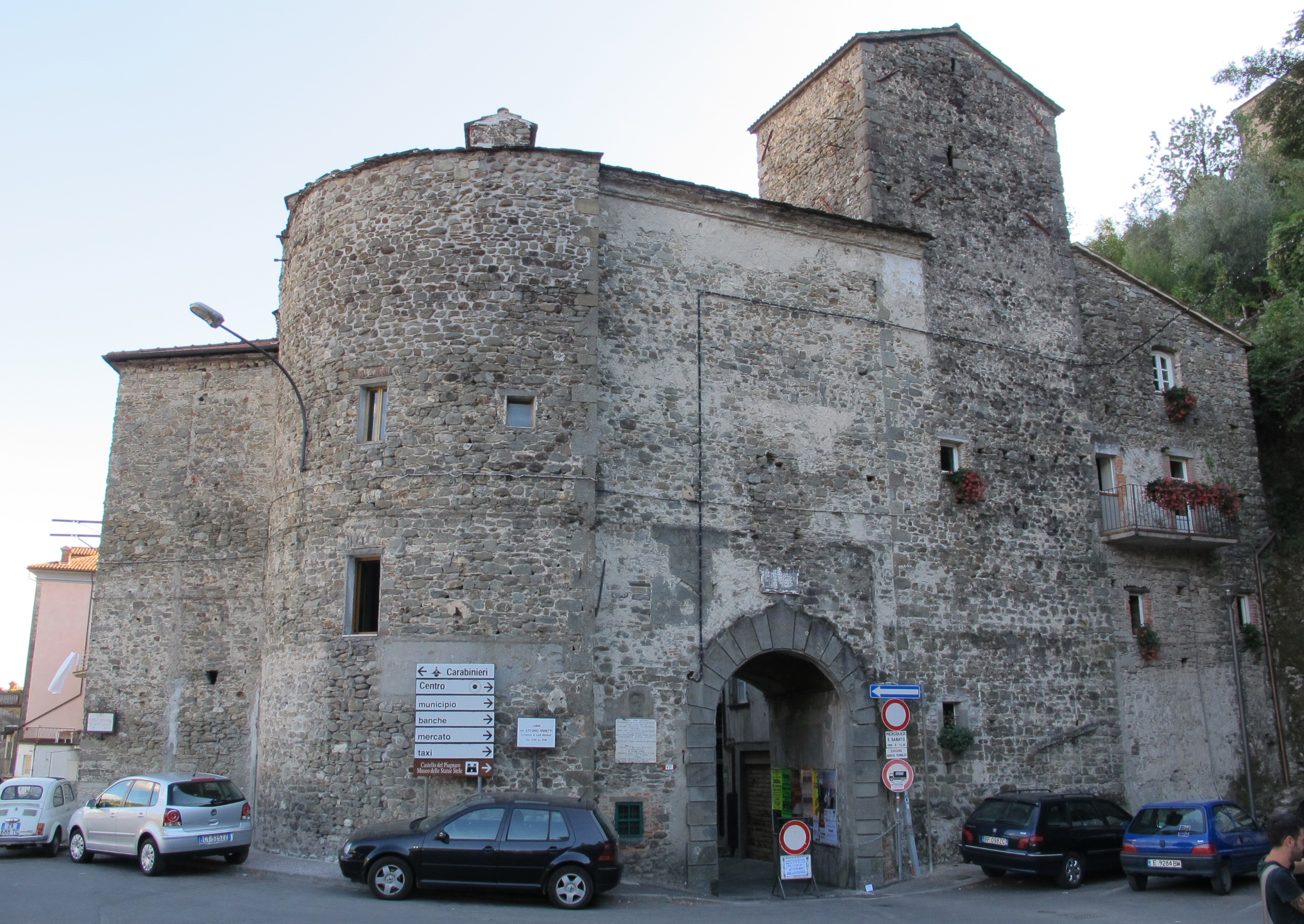 Pontremoli, Porta Parma o di Sommoborgo